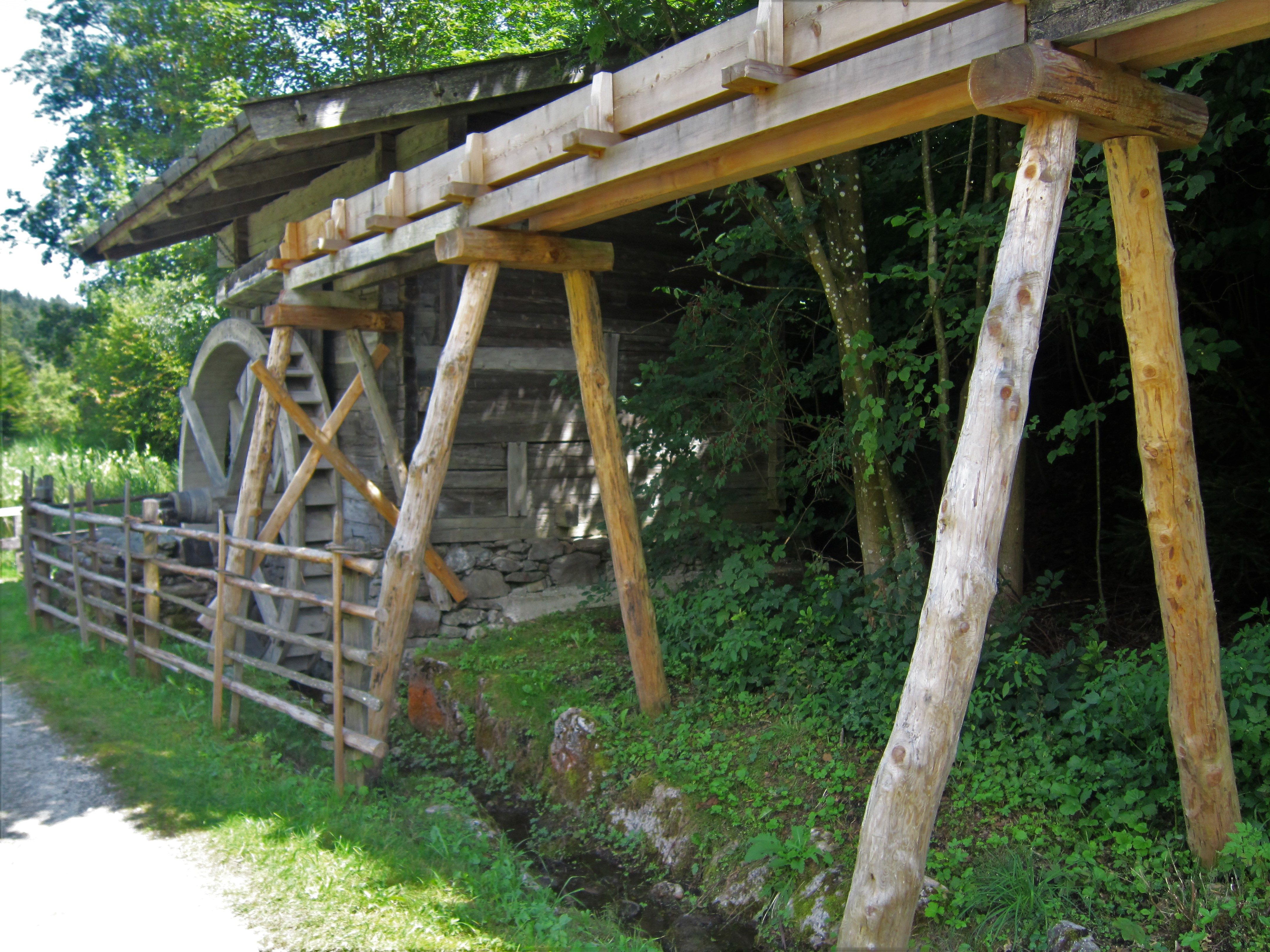 Wassermühle auf dem Gelände des Museums Tiroler Bauernhöfe Kramsach (Tirol)